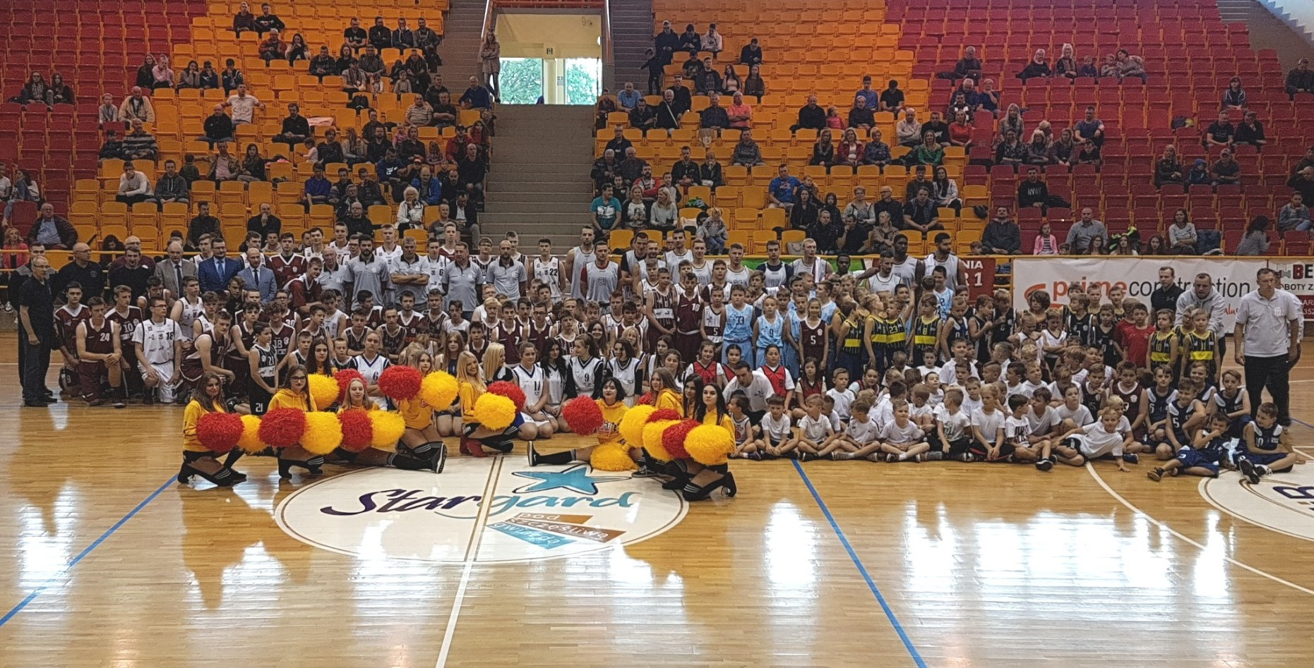 Prezentacja zespołów Spójni Stargard (29.09.2018)